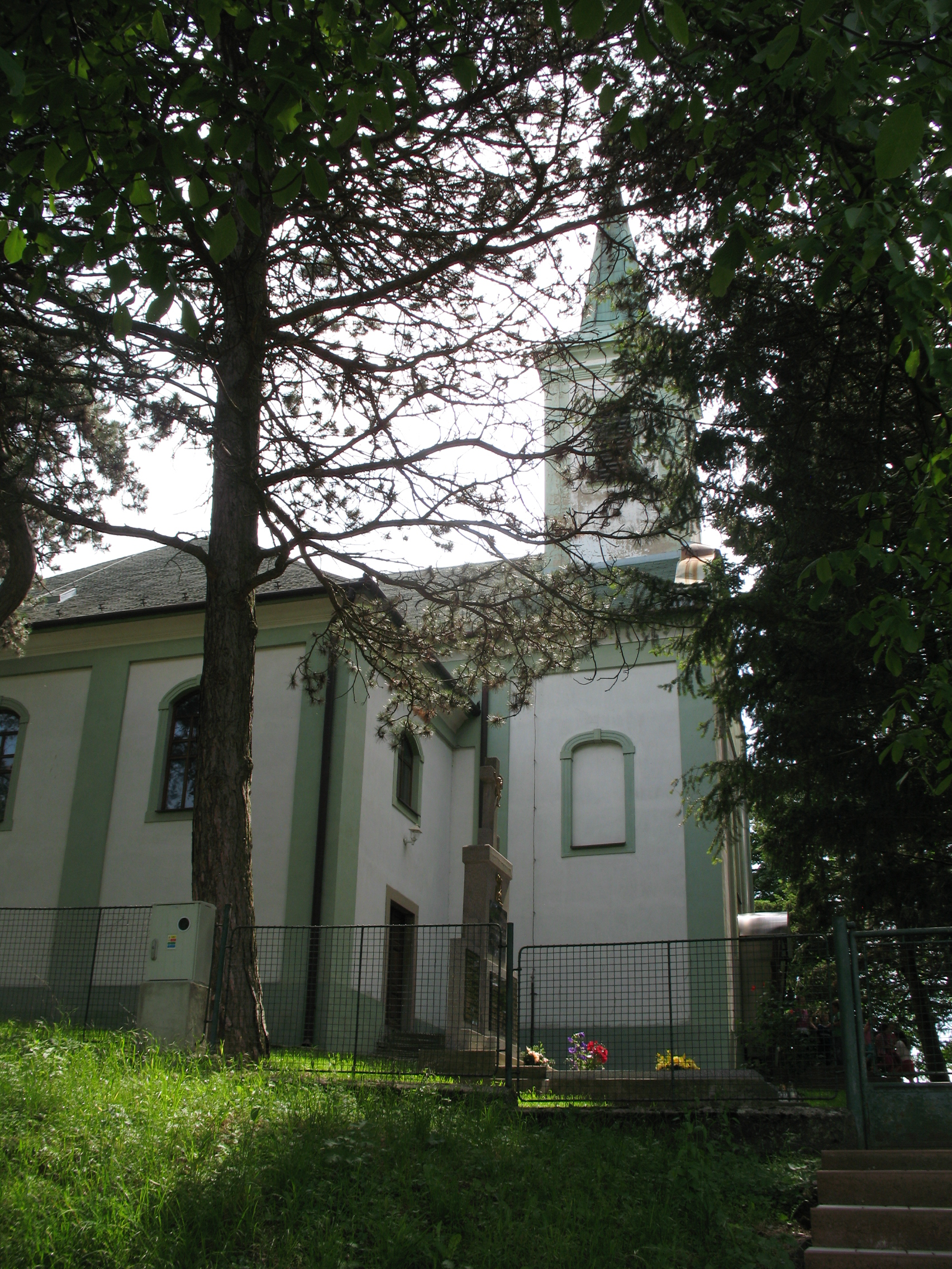 Cseke